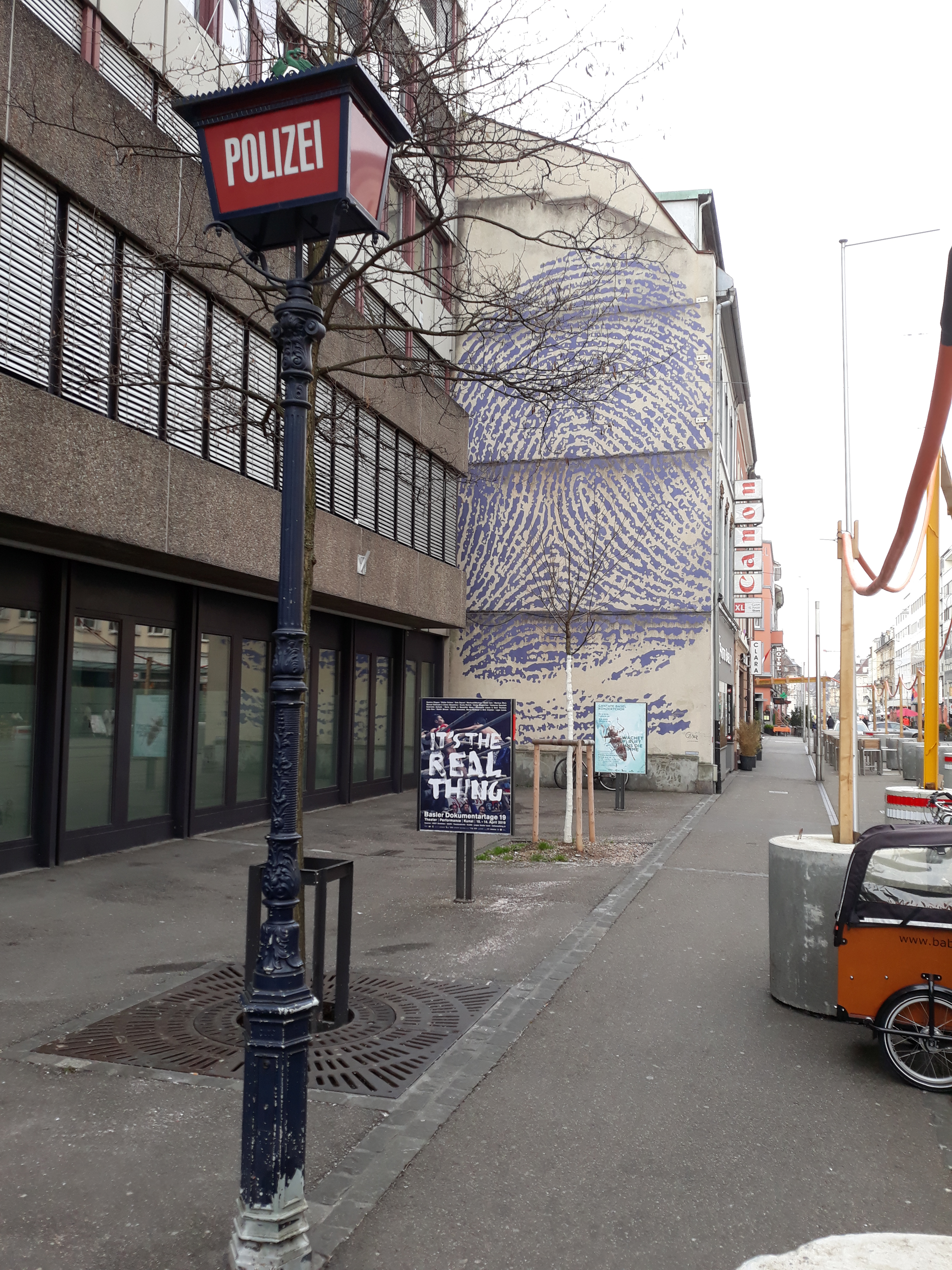 Das Wandbild "Fingerabdruck", 1982 von dem schweizerischen Künstler Jean-Pierre Zangger in der Clarastrasse 38, Basel (Schweiz) neben einer Polizeiwache fertiggestellt.